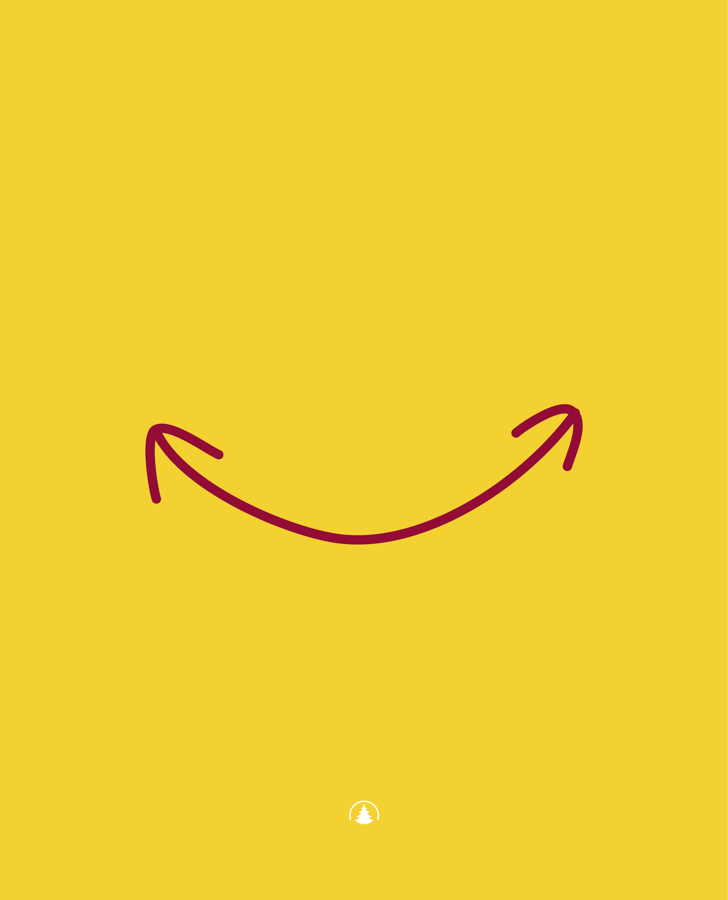 Latterlig lønnsomt - Om humor og begeistring på jobben - av Trond Haugen og Jon Morten Melhus